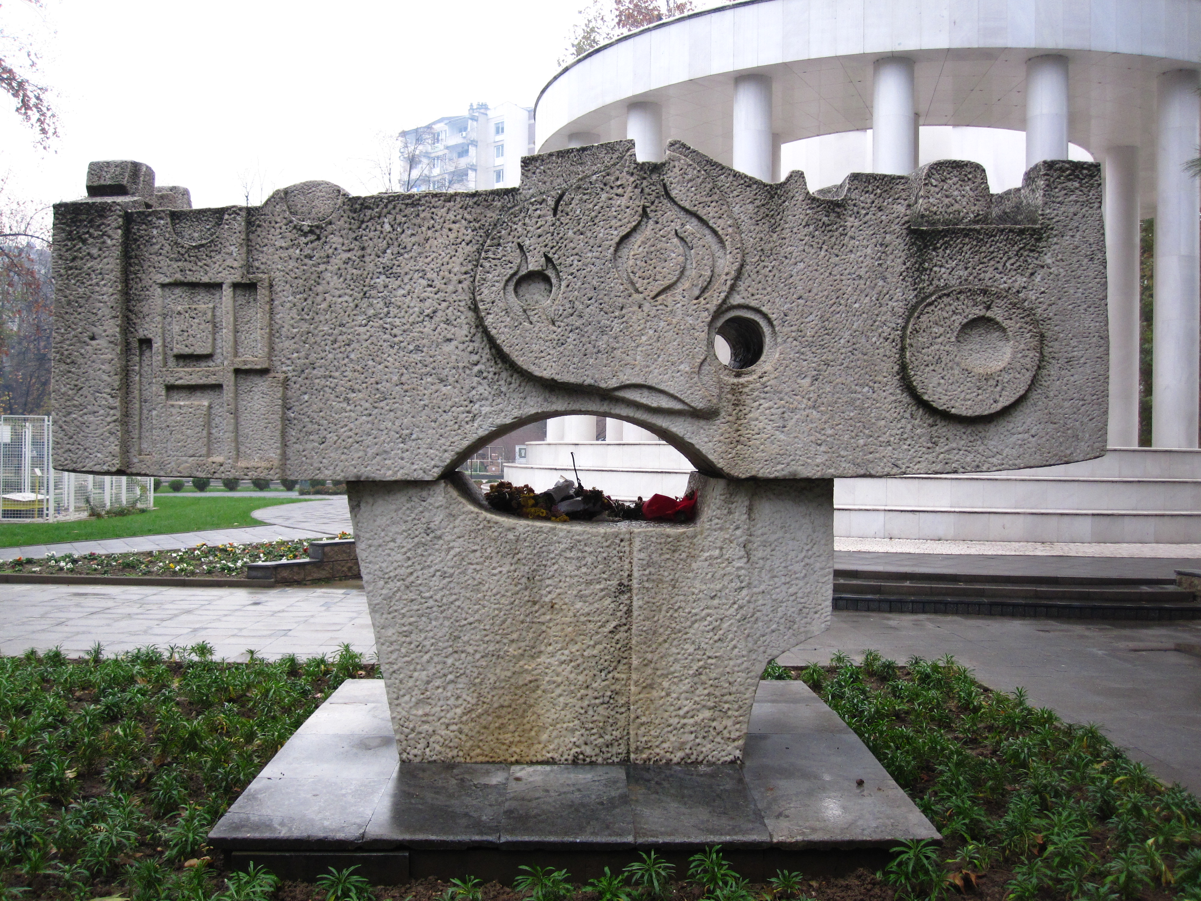 Споменик во Жена Парк - Скопје.